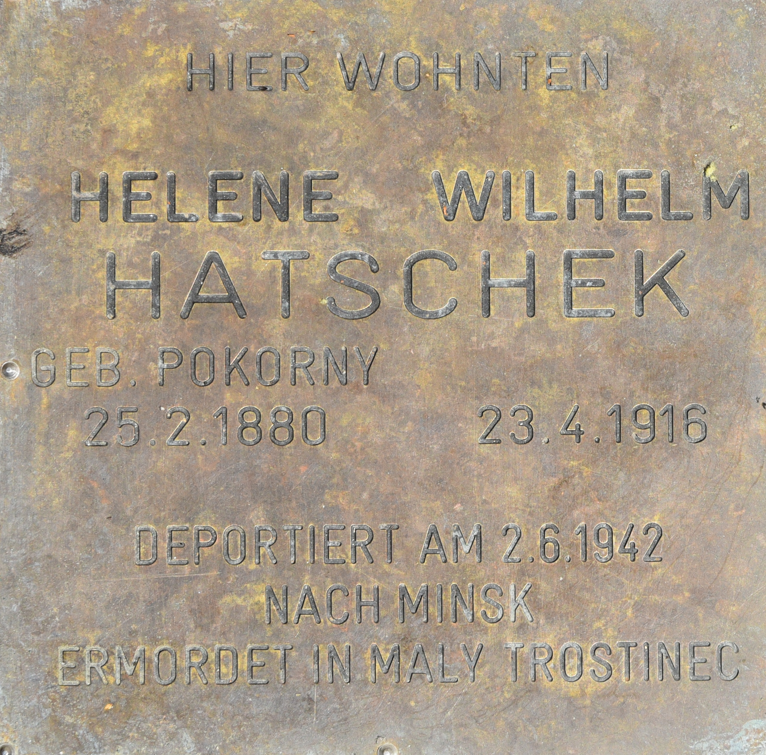 Steine der Erinnerung Wien-Liesing, Helene und Wilhelm Hatschek, Endresstraße 16, 1230 Wien